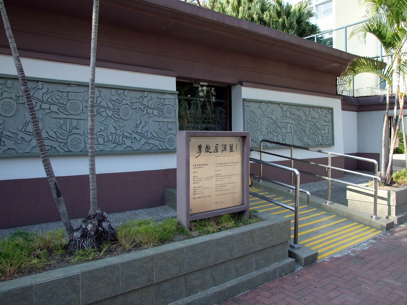 李鄭屋漢墓博物館正門